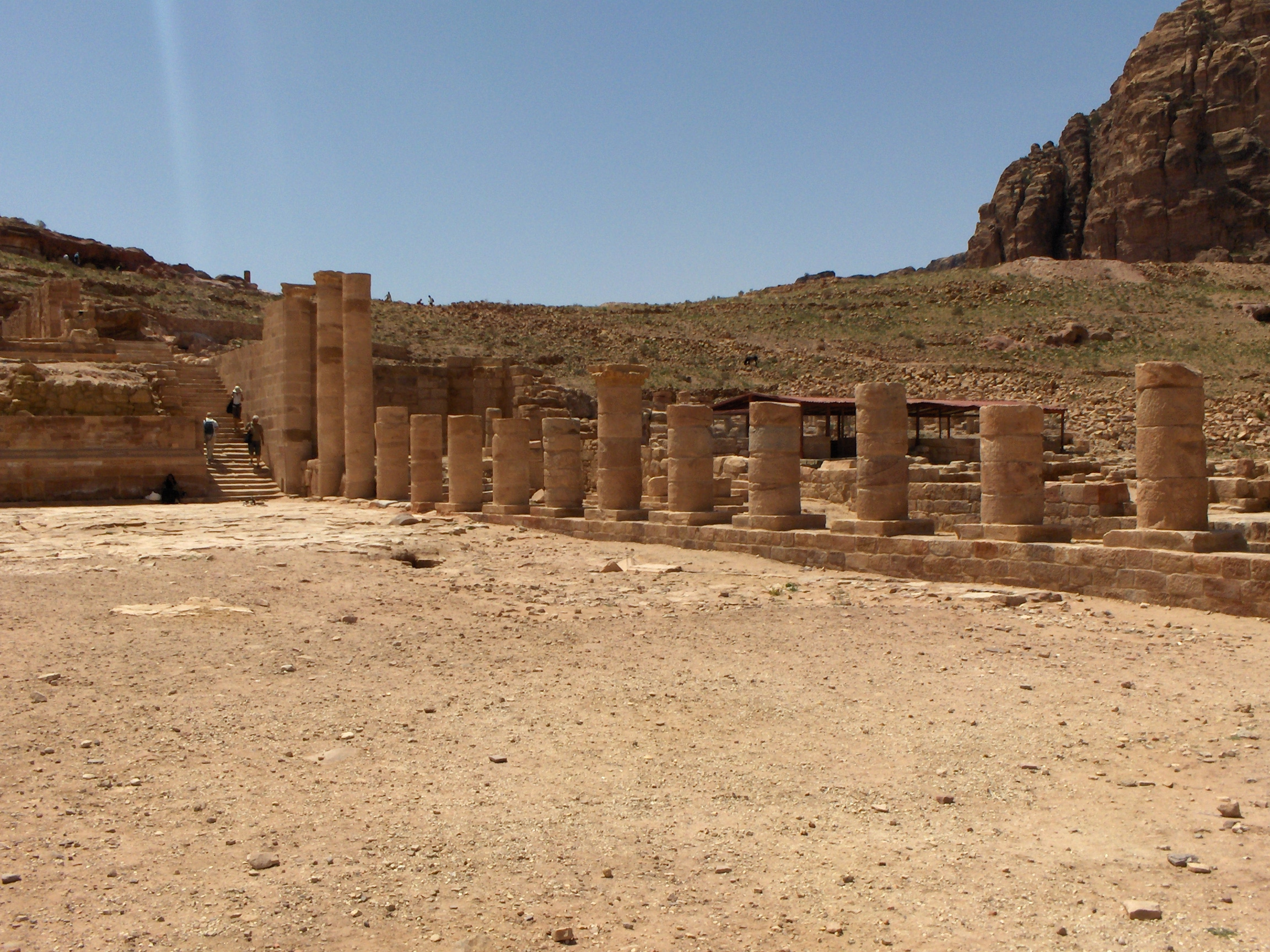 il grande tempio di Petra